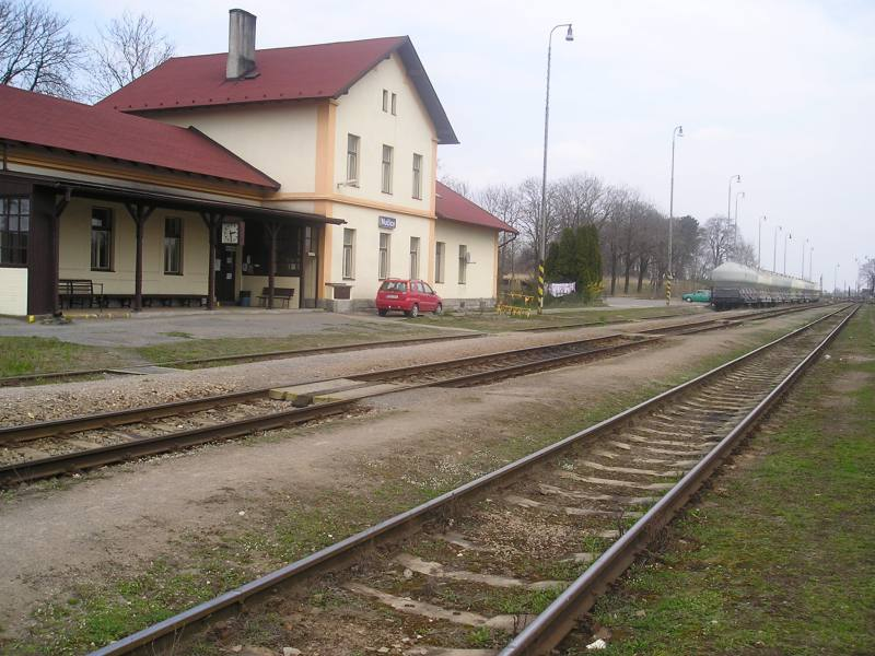 Nučice (okres Praha-západ) - nádraží.